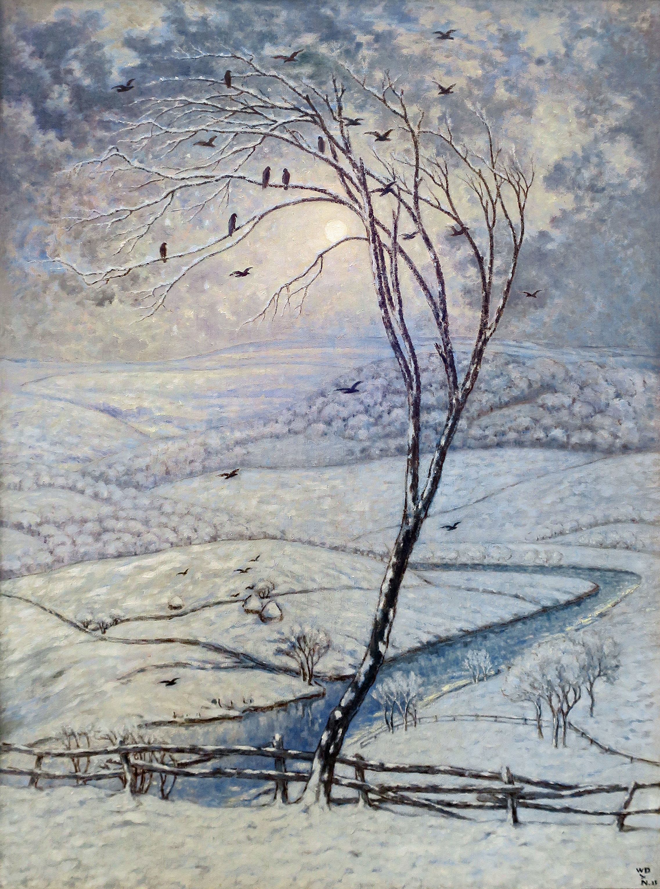 Les corbeaux